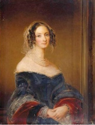 Юсупова Зинаида Ивановна (княгиня, 1840-1841) урожд. Нарышкина